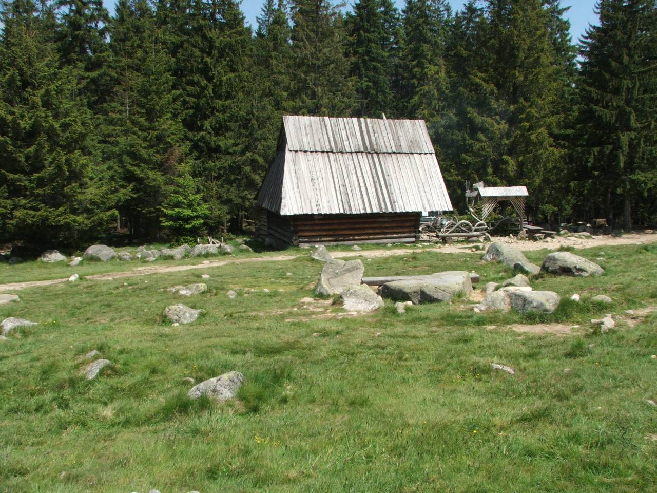 Rusinowa Polana. Szałas - wyrób i sprzedaż oscypków